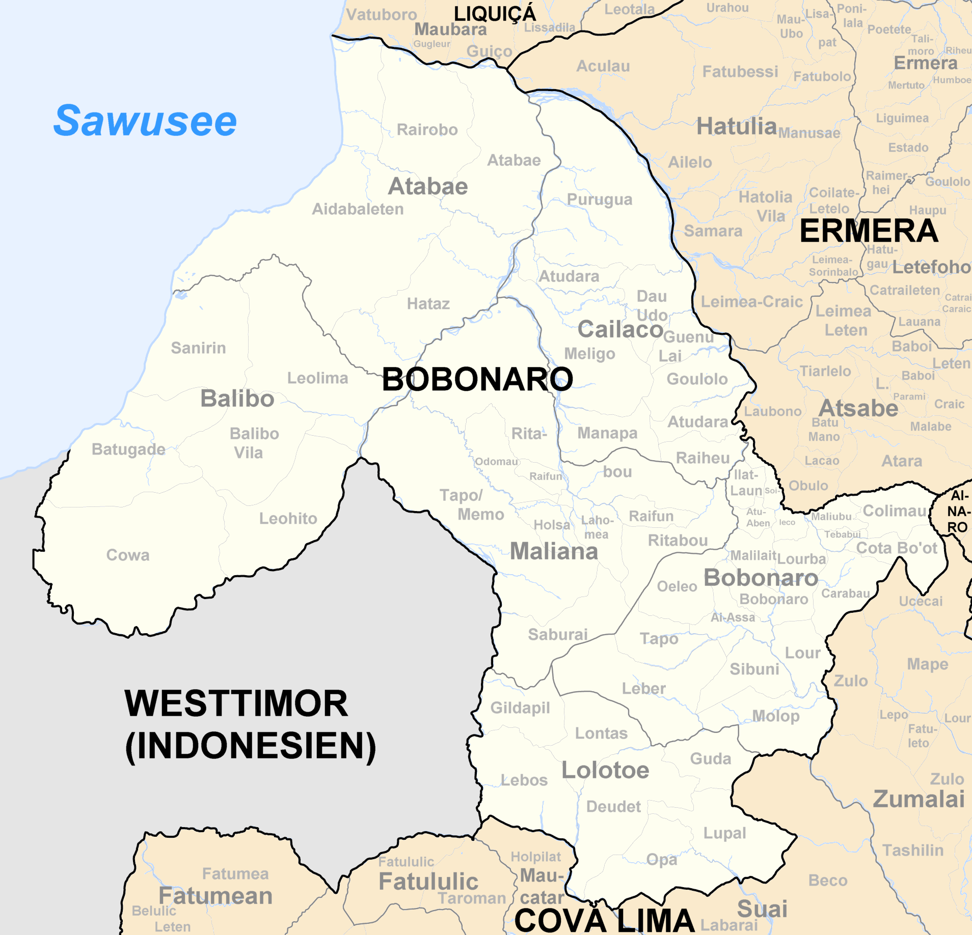 Sucos des Distrikts Bobonaro/Osttimor nach der Neustrukturierung 2004